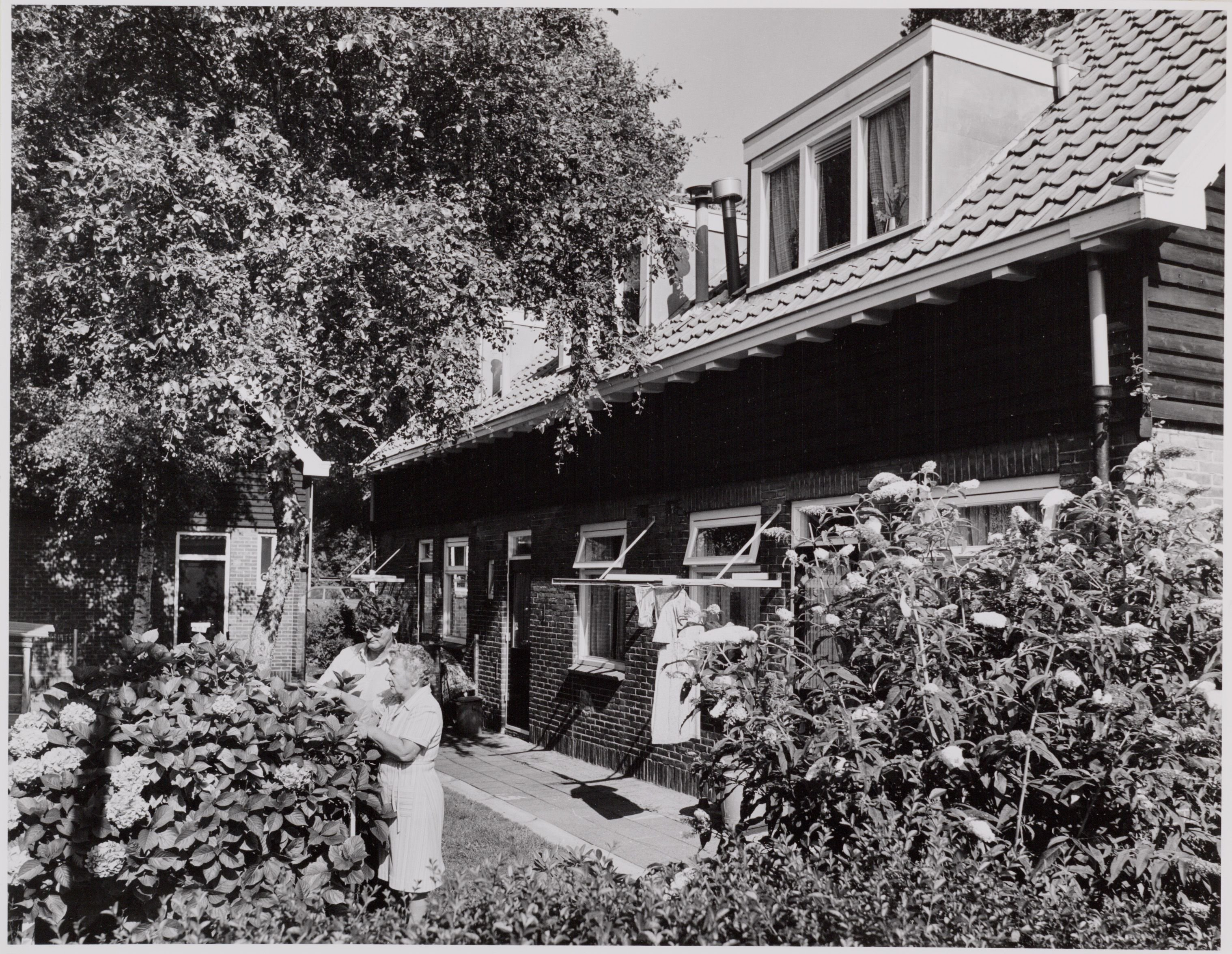 Vogelstraat, Eerste 27, Achterzijde percelen: Zamenhofstraat 44-40 (vrnl.)